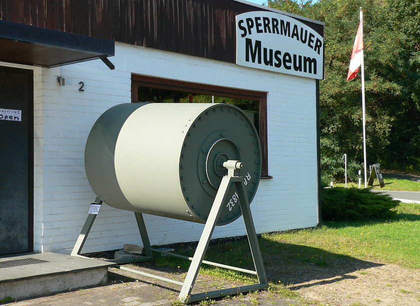 Rotationsbombe